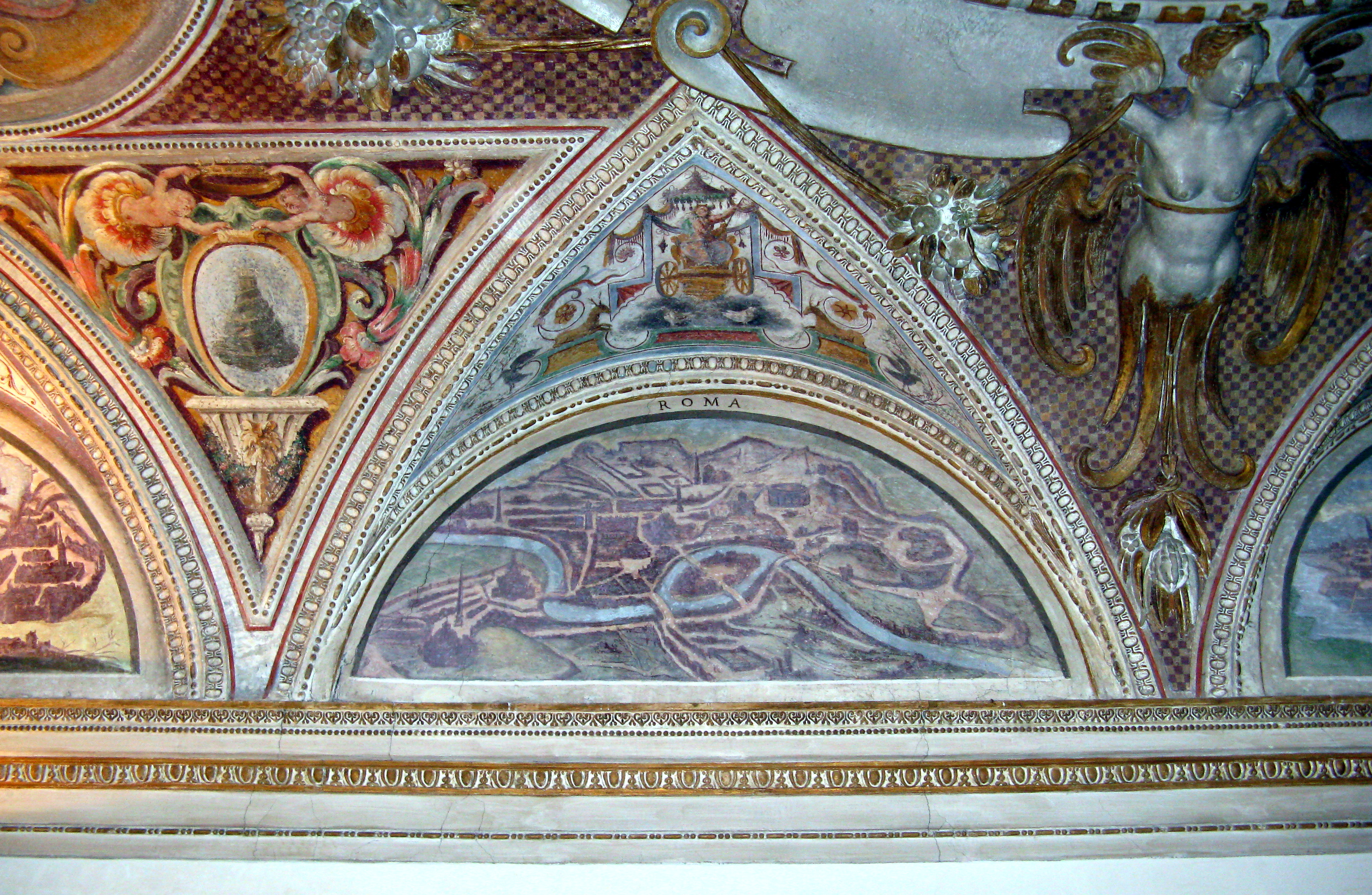 Mappa di Roma nel Palazzo Ducale di Mantova